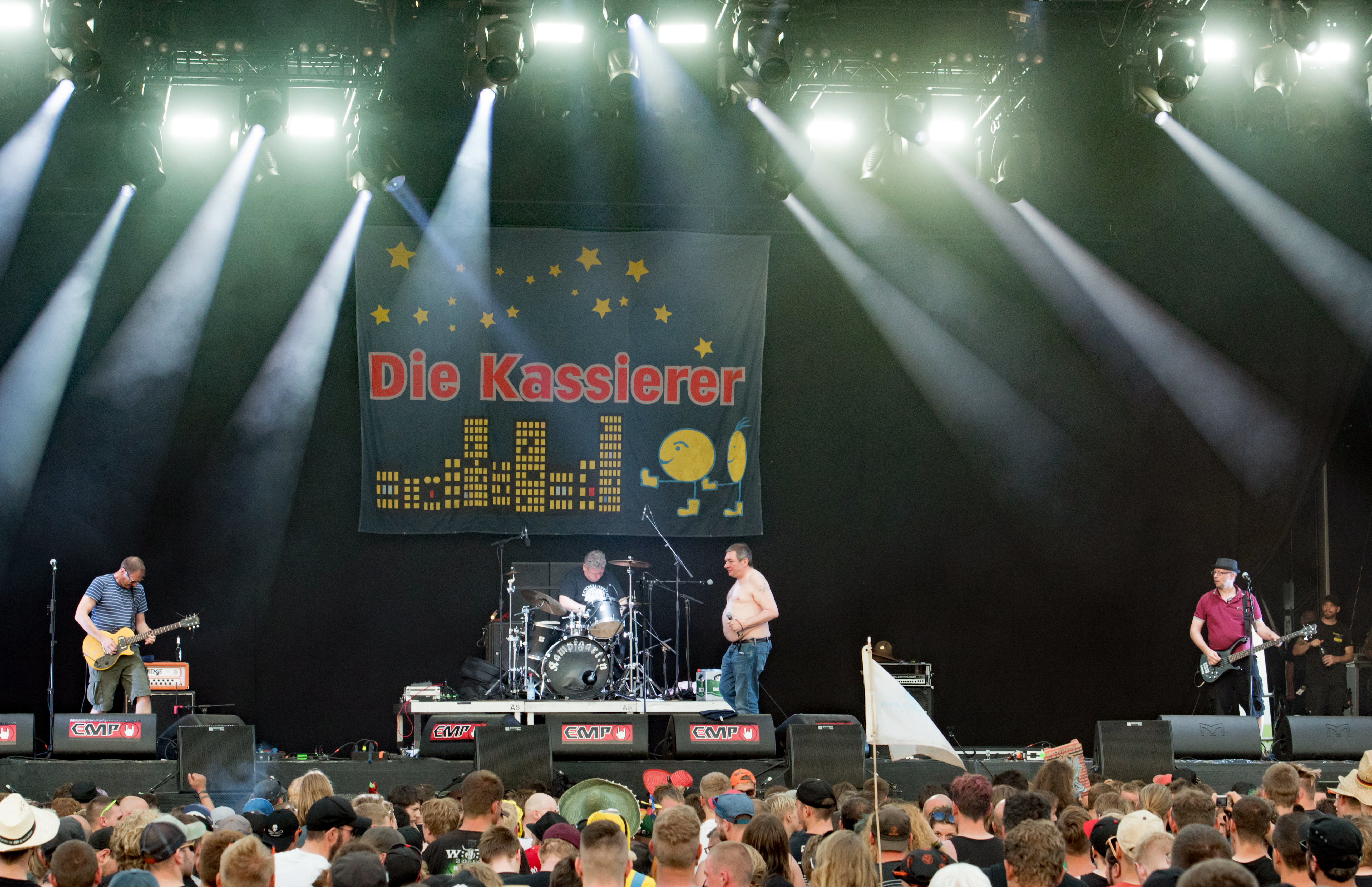 Die Kassierer auf dem Reload Festival 2016